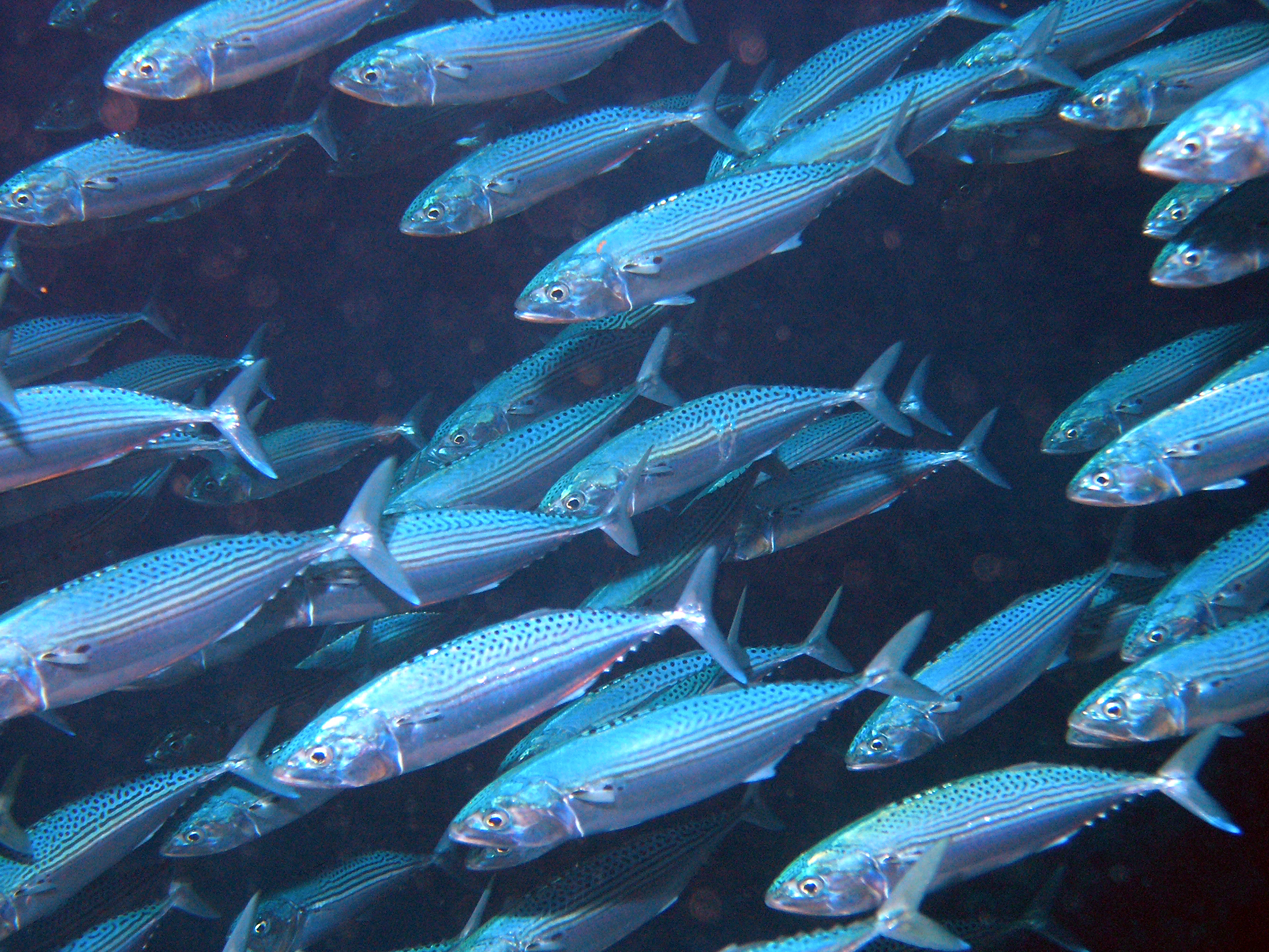 Indian Mackarel (Rastrelliger kanagurta)